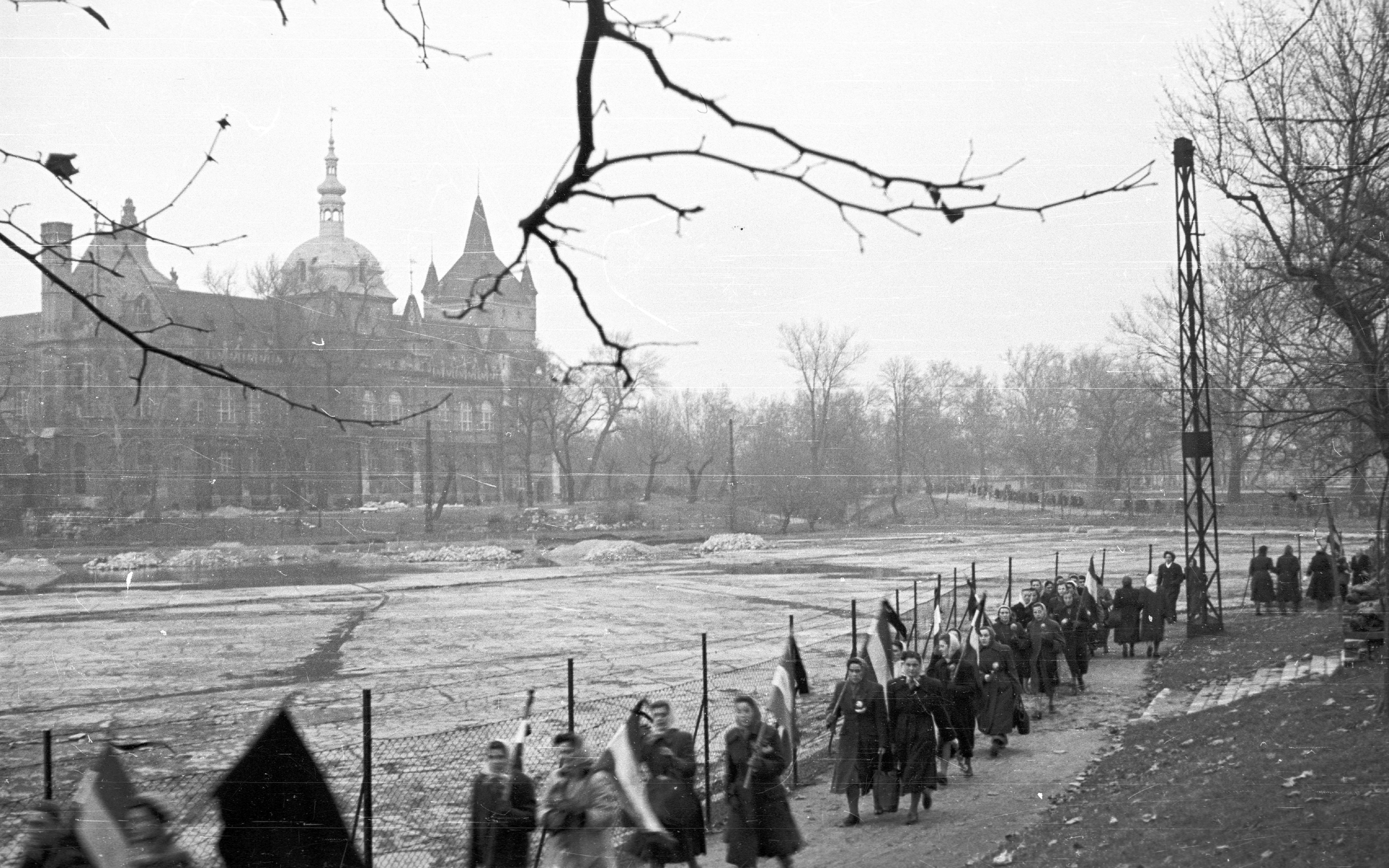 háttérben Vajdahunyad vára. 1956. december 4-i Nőtüntetés. Location: Hungary, Budapest XIV. Tags: Budapest, revolution Title: háttérben Vajdahunyad vára. 1956. december 4-i Nőtüntetés.